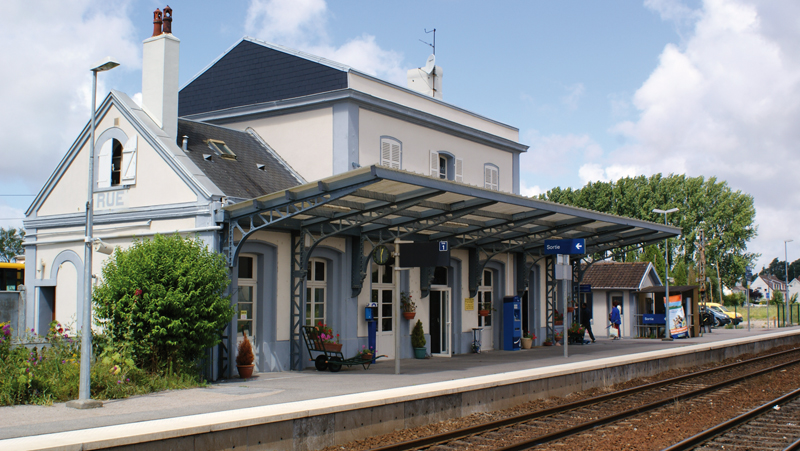 Gare de Rue (Somme) en juillet 2009